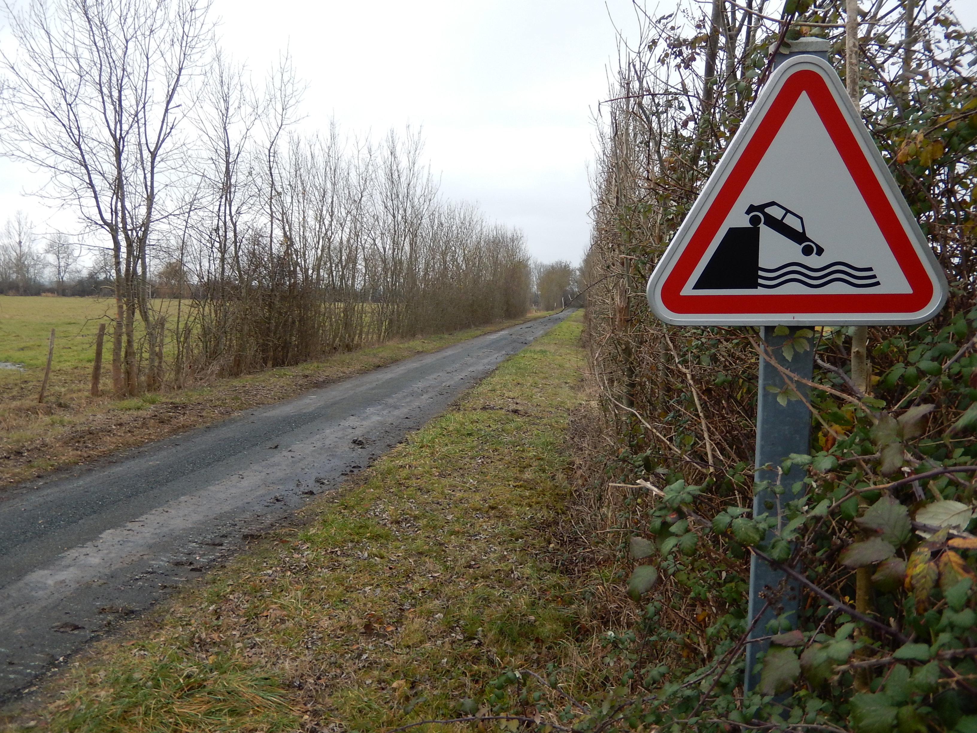 Photo prise au même endroit que File:Panneau A20 (France) à Crazannes (Charente-Maritime).jpg.